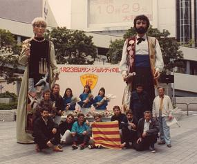 Gegants de l'ACGC (Agrupació de Colles de Geganters de Catalunya) al Japó l'any 1989. Aquests gegants representen Catalunya arreu on van. Representen el Treball i la Cultura.